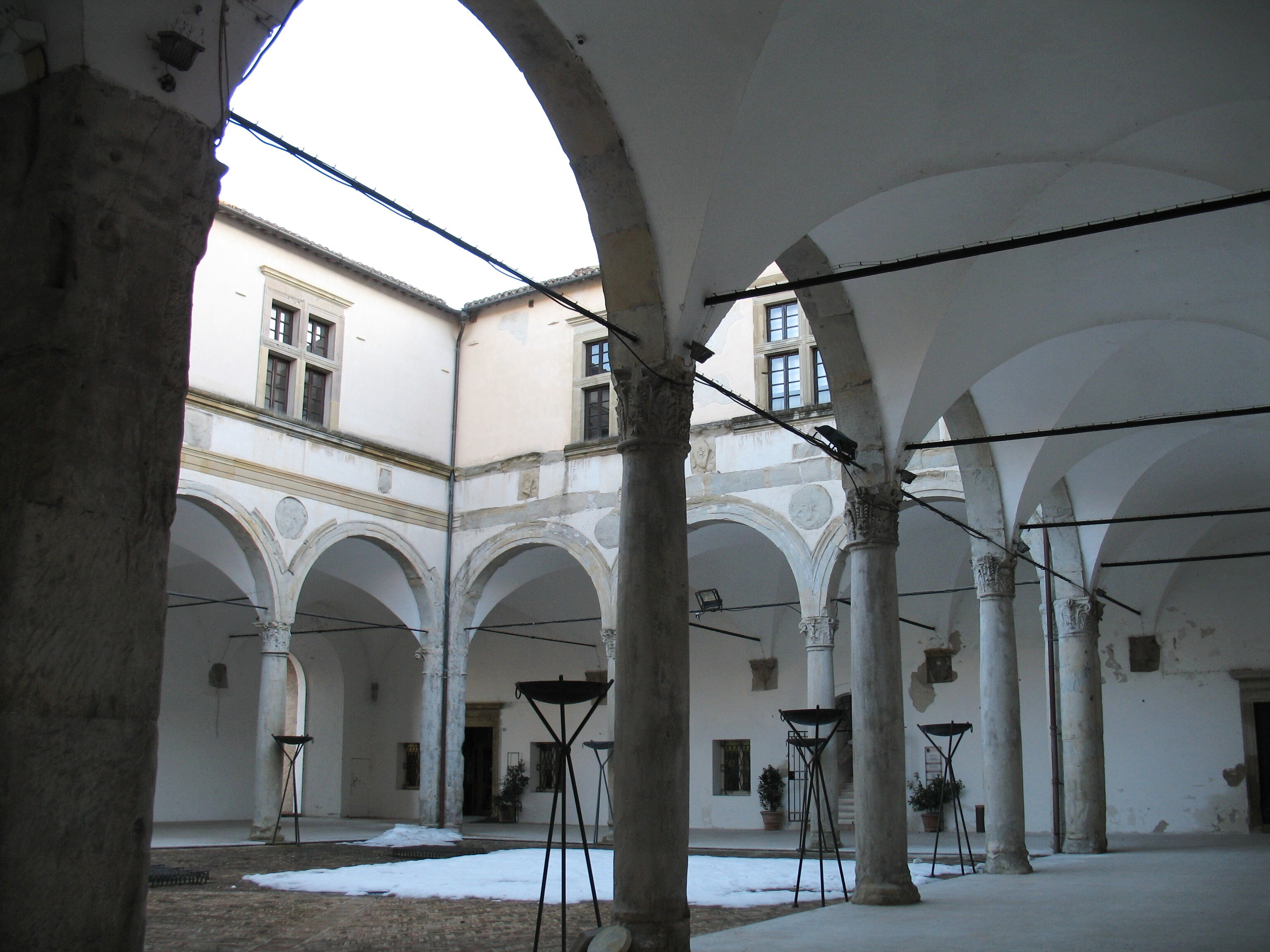 Palazzo Ducale - sídlo rektorátu univerzity